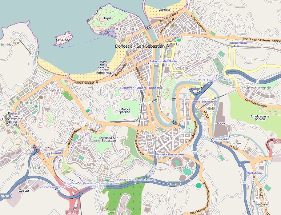 Donostia hiriaren erdiguneko kokapen mapa. Gipuzkoa, Euskal Herria. - Location map of Donostia city´s center. Gipuzkoa, Basque Country.